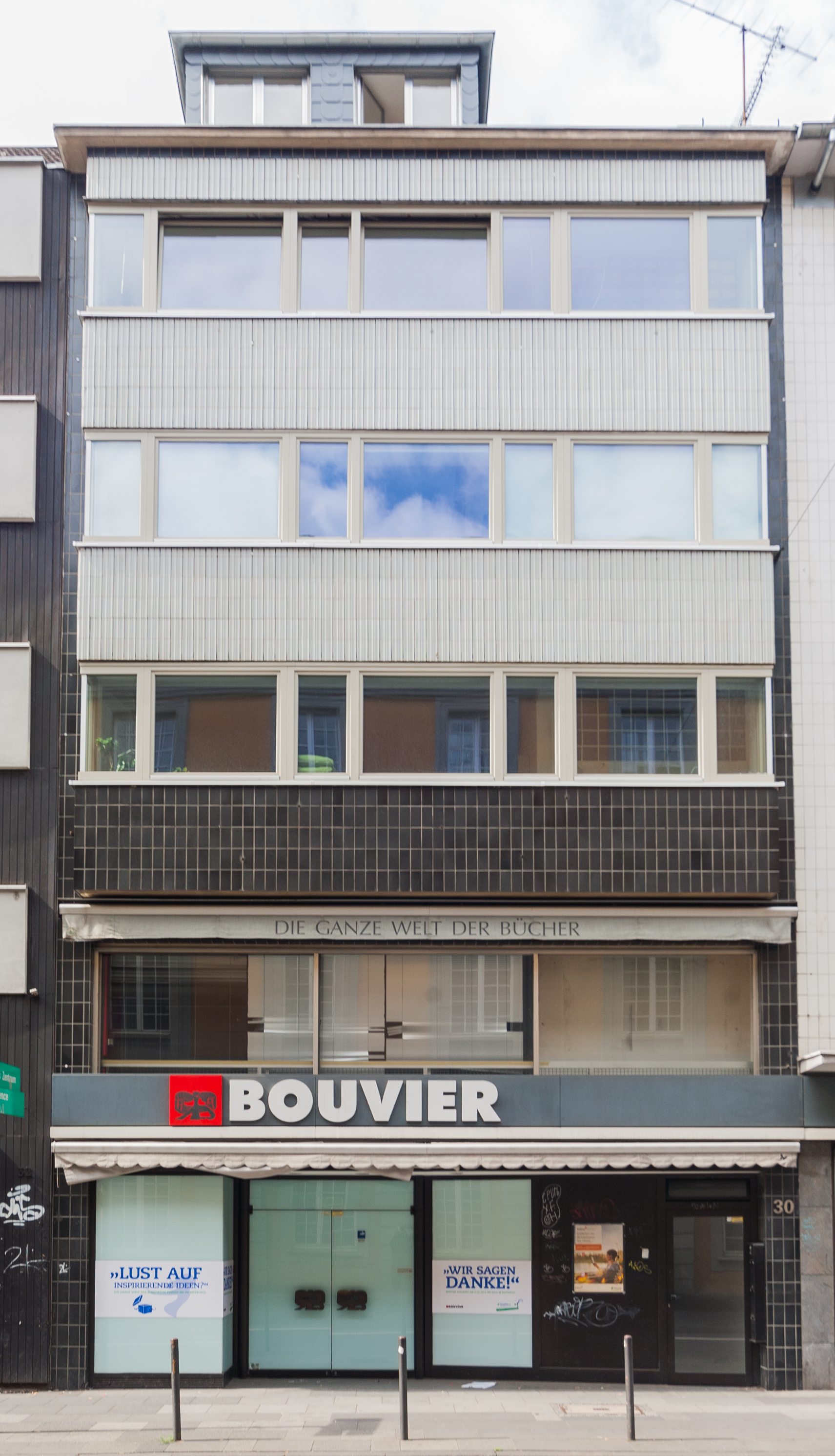 Ehem. Bouvier, Am Hof 30, Bonn